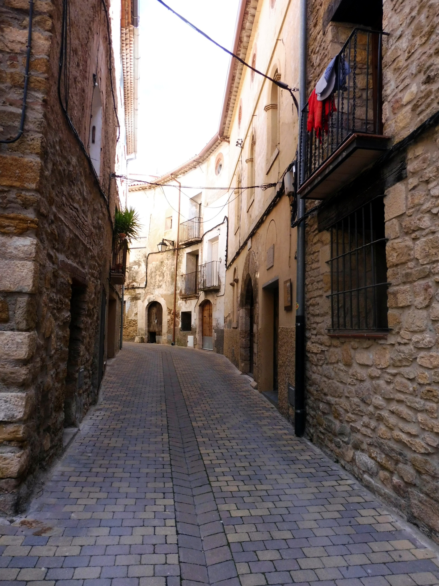 Nucli històric d'Àger: carrer Sant Martí